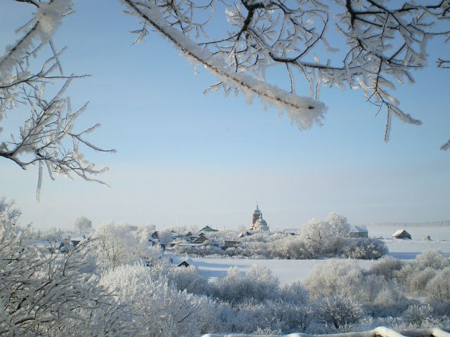 Село Нечаевка, Мокшанского района, Пензенской области